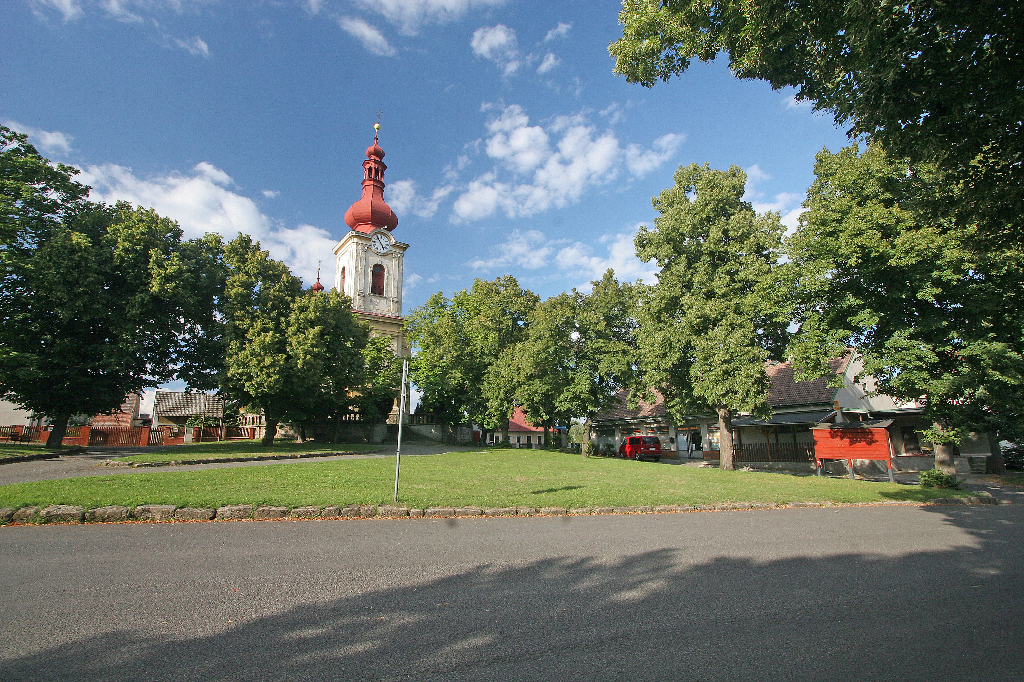 Kostel sv. Maří Magdaleny, Holany